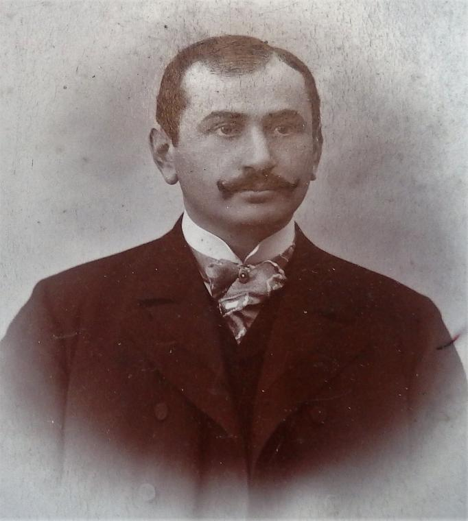 Emil Saudek, český překladatel